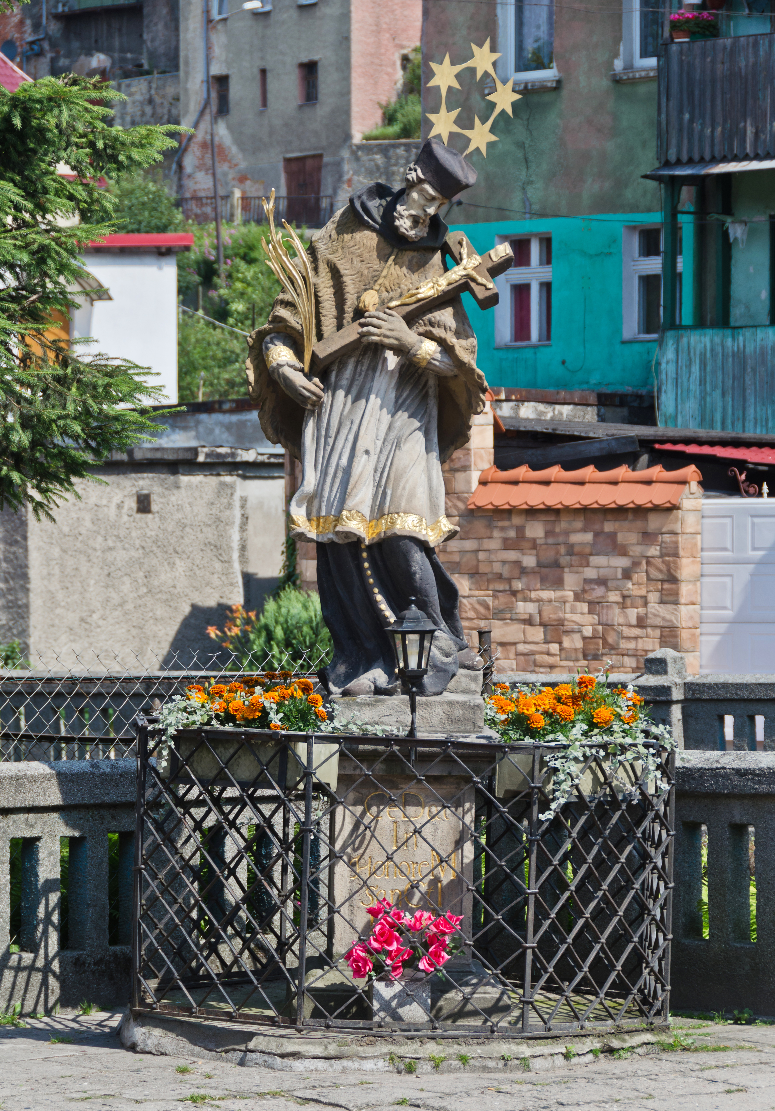 Bystrzyca Kłodzka, miasto